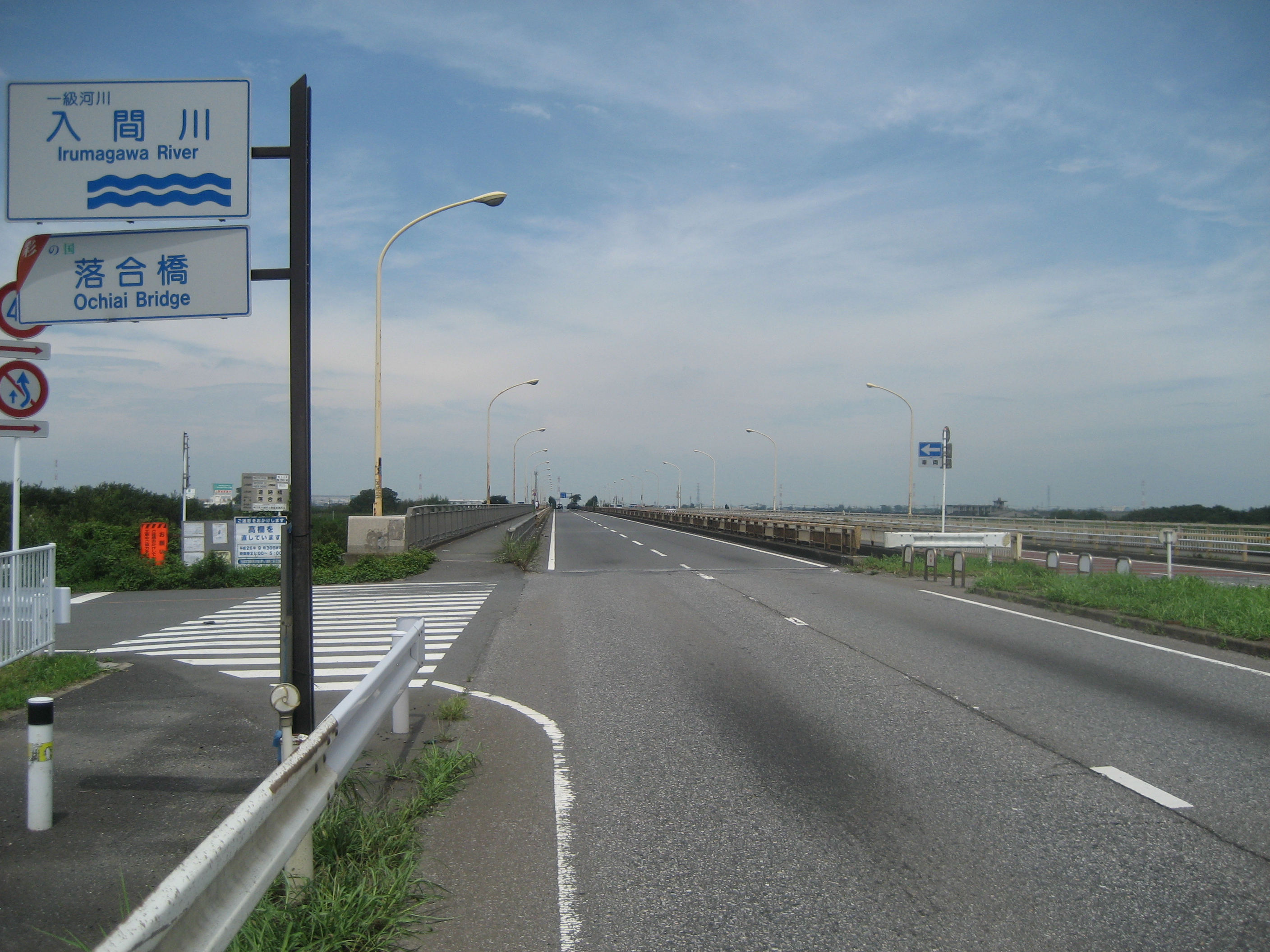 国道254号線埼玉県川越市落合橋付近（東松山方面を撮影）